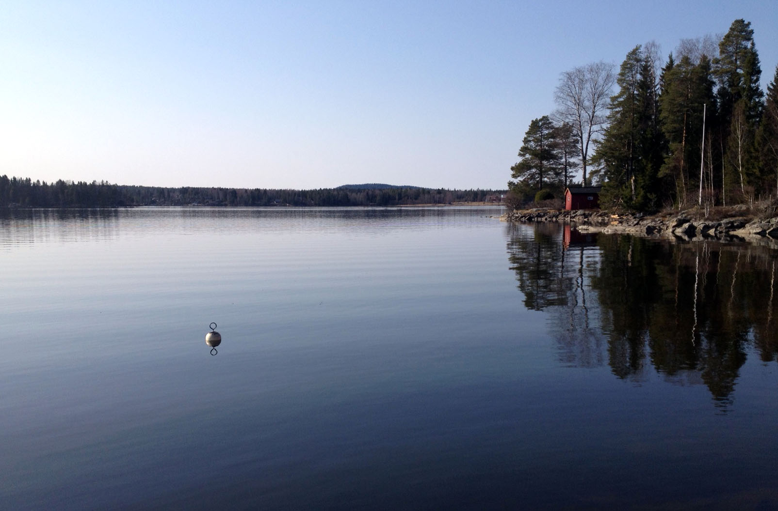 Lyseren, sett fra Hemnestangen